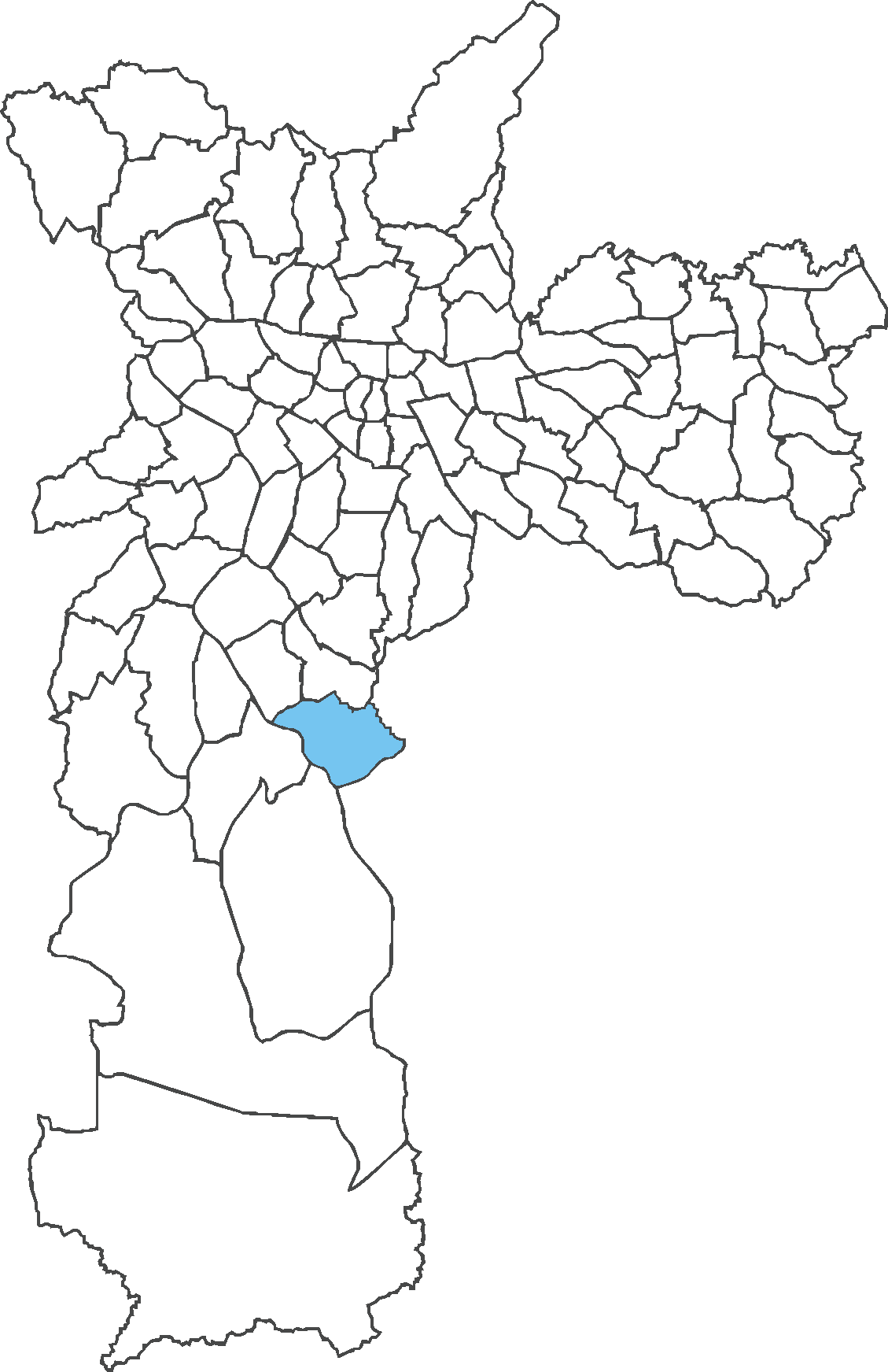 Localização do distrito de Pedreira no município de São Paulo.